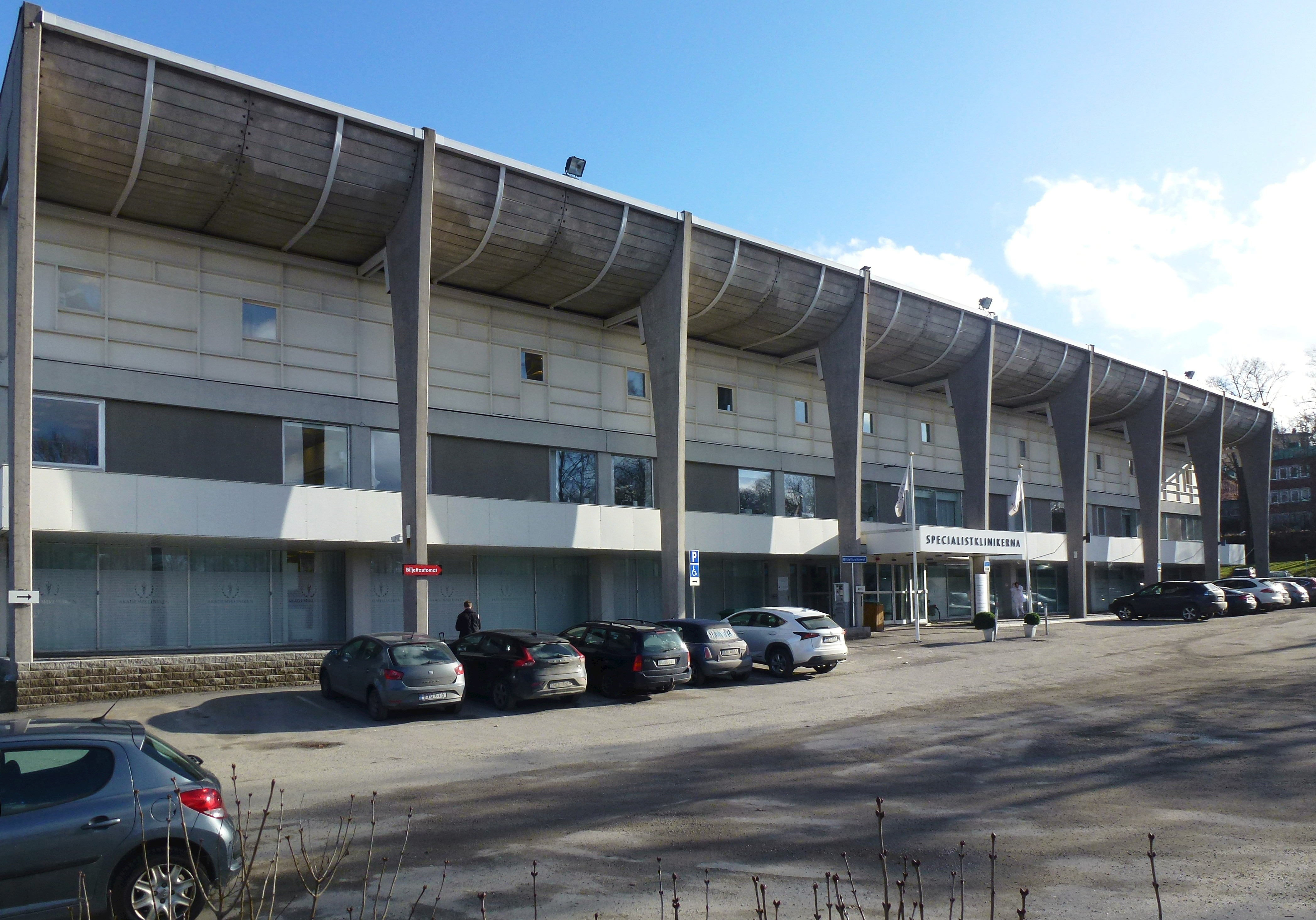 F.d. byggnaden för Svenskt Möbelcentrum på Storängsbotten, idag Specialistklinikerna, arkitekt Gustaf Lettström